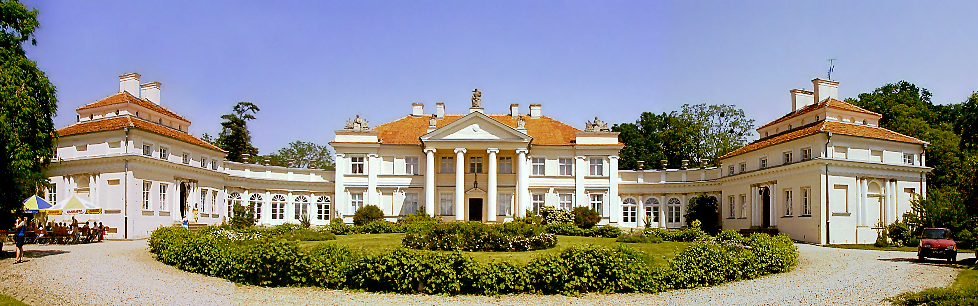 Śmiełów, pałac [składanka 3xfoto: 252-11 (L), 252-12(M),252-13 (R)]